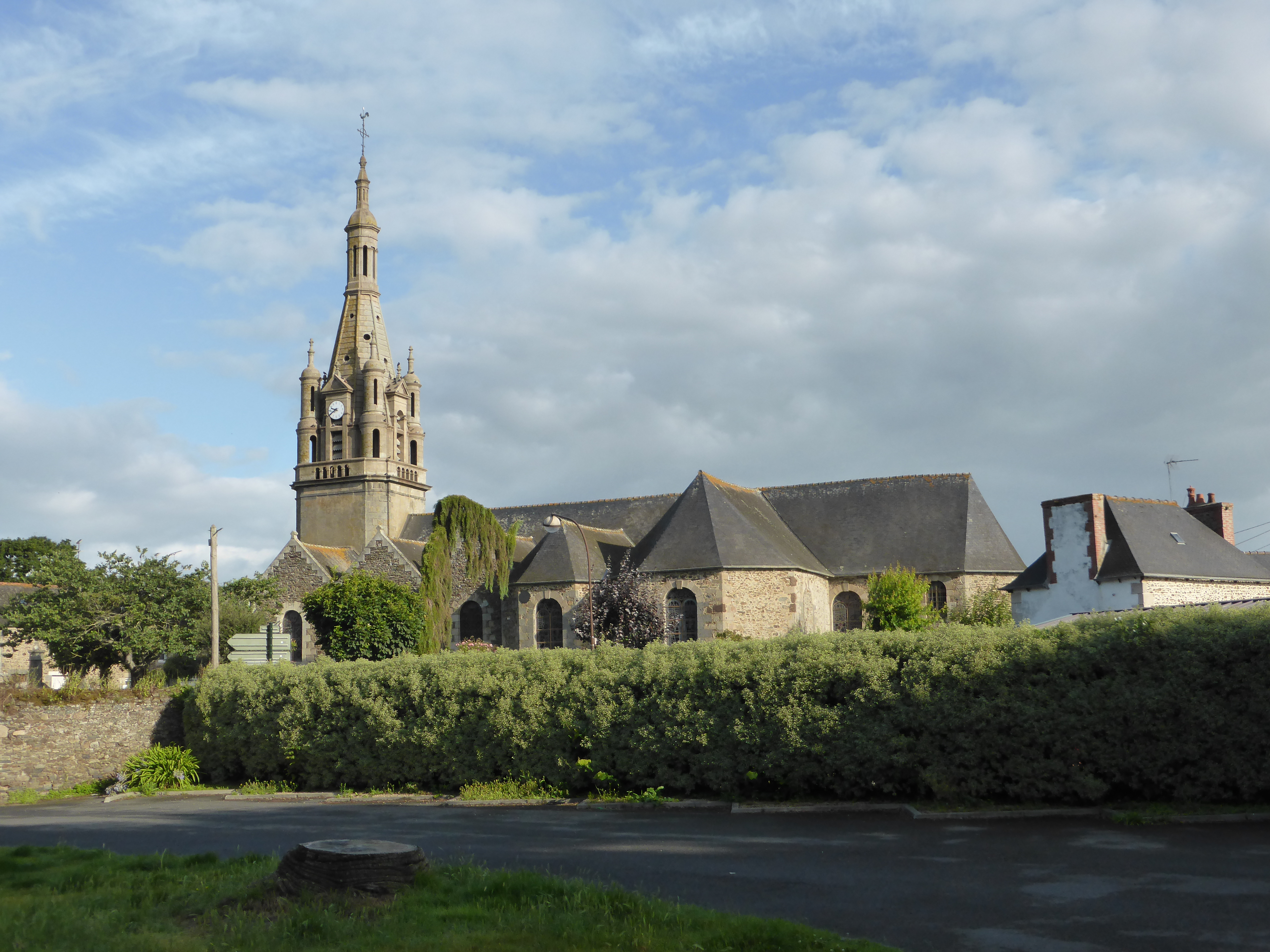 Église Saint-Pierre de Plourhan, dans les Côtes-d'Armor, en France.